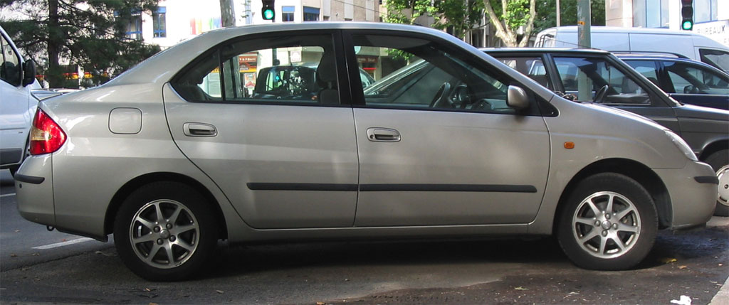 Toyota Prius I photographiée à Lyon